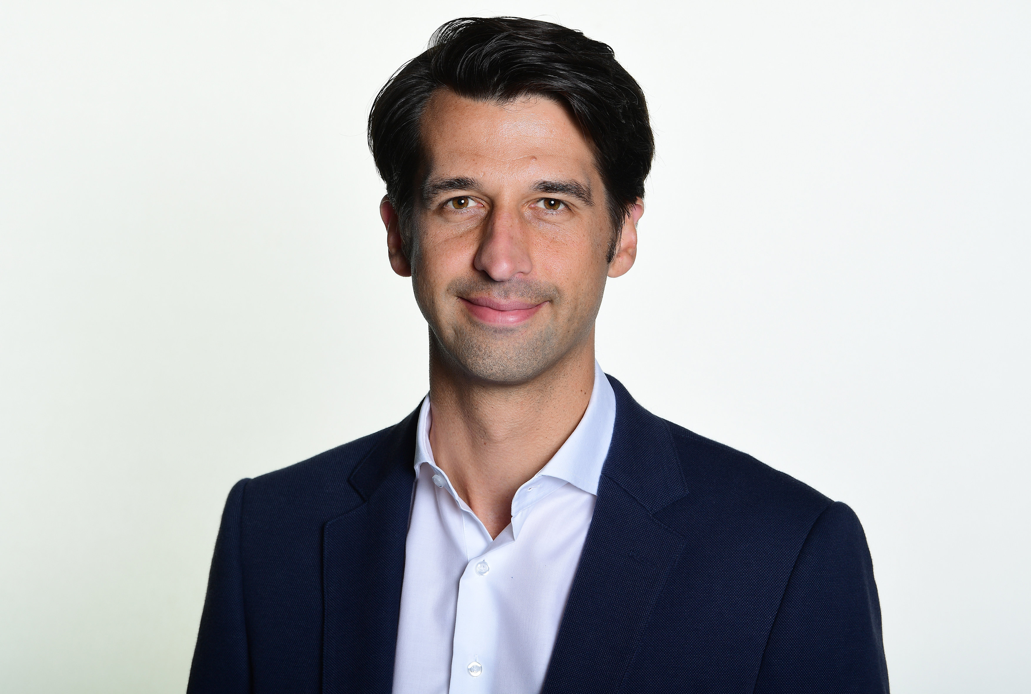 Jonas Boldt (Vorstand Sport) Hamburg, 16.07.2019, Fussball Hamburger SV, Fototermin